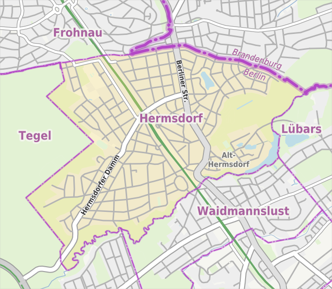 Übersichtskarte der Straßen und Ortslagen in Berlin-Hermsdorf